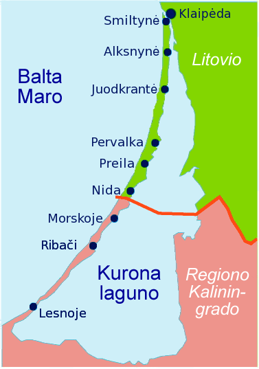 La Kurona Duoninsulo kaj kurona laguno en Litovio kaj la regiono Kaliningrado mapo: Thomas Pusch 2006 09 01 surbaze de la bildo Nehrung.png germanlingva Aldone pro la permesoŝanĝo validas la sekva permeso